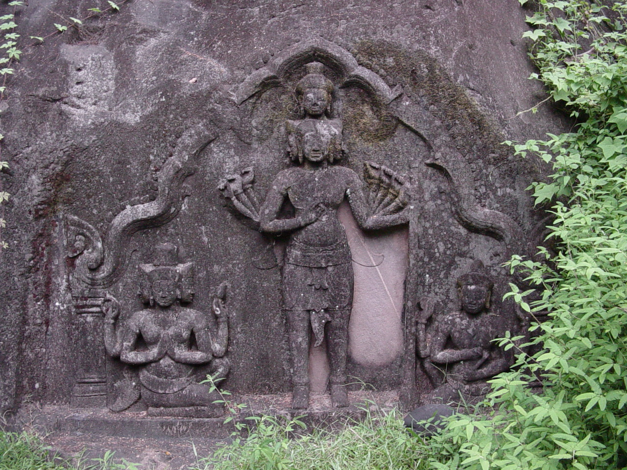 Bas-relief à l'extérieur du Vat Phou